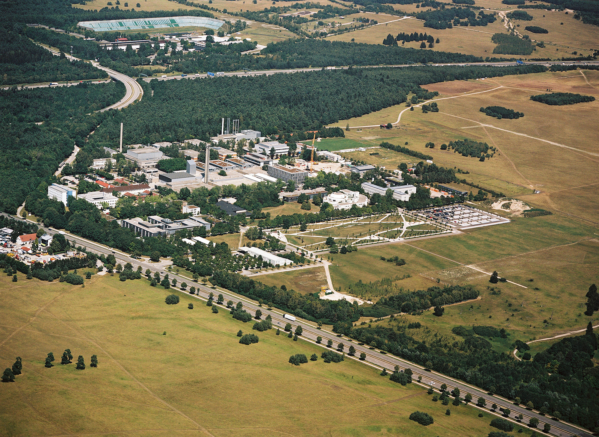 Helmholtz Zentrum München, Luftbild